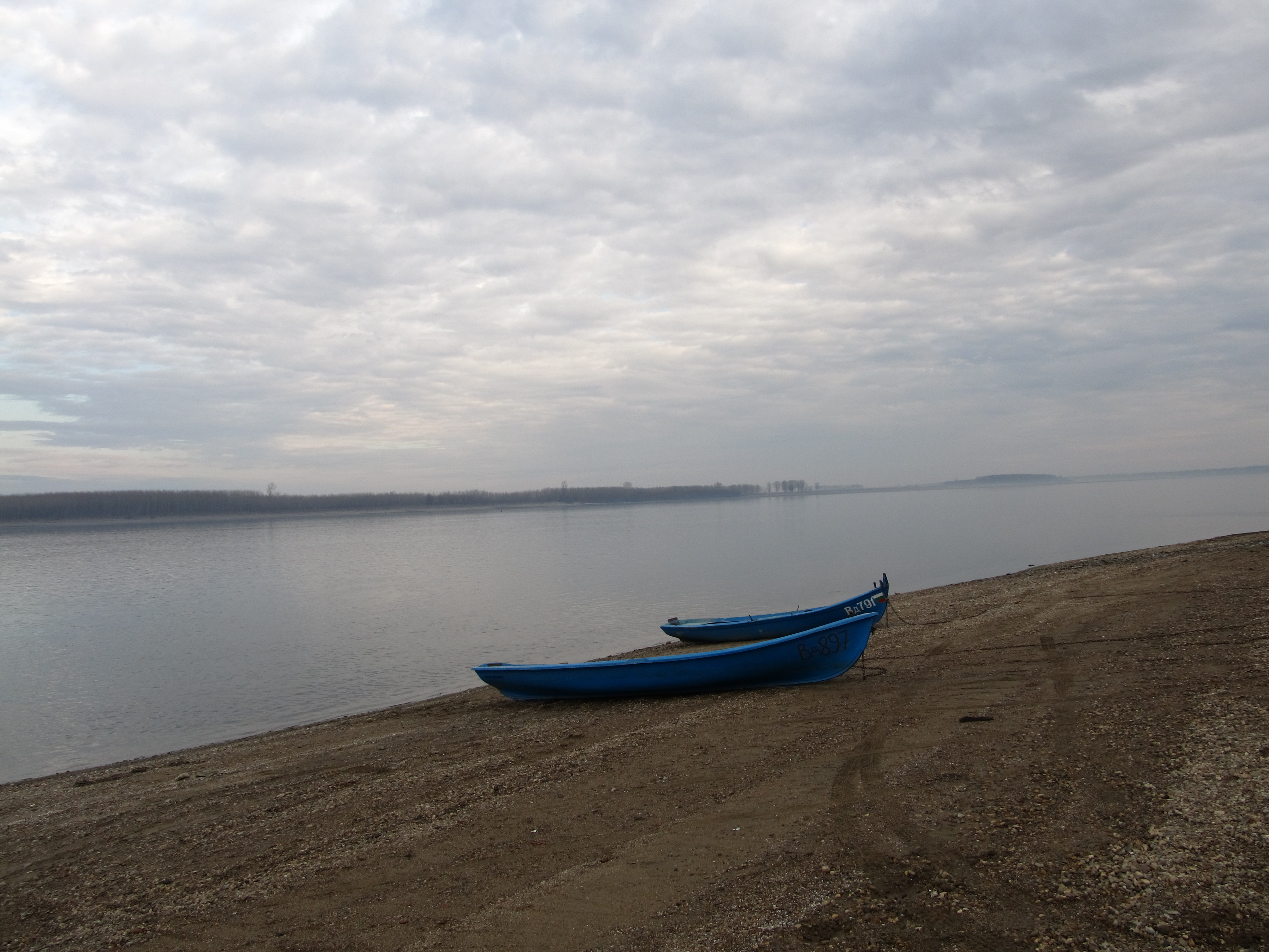 Място За Риболов и Отдих